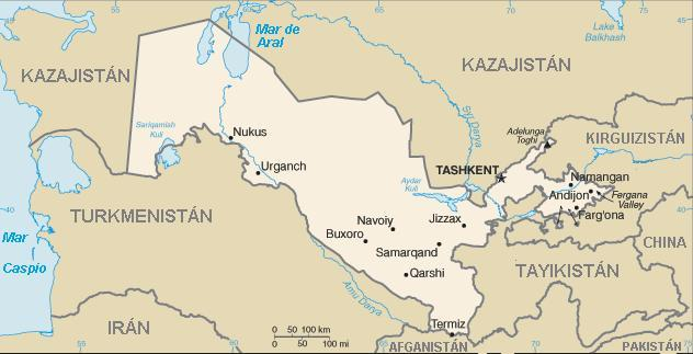 Organización político-administrativa de Uzbekistán.